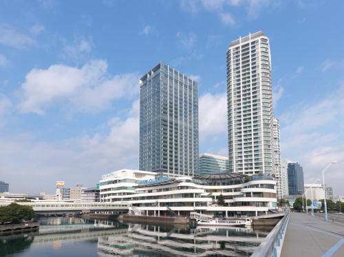 横浜ダイヤビルディング全景